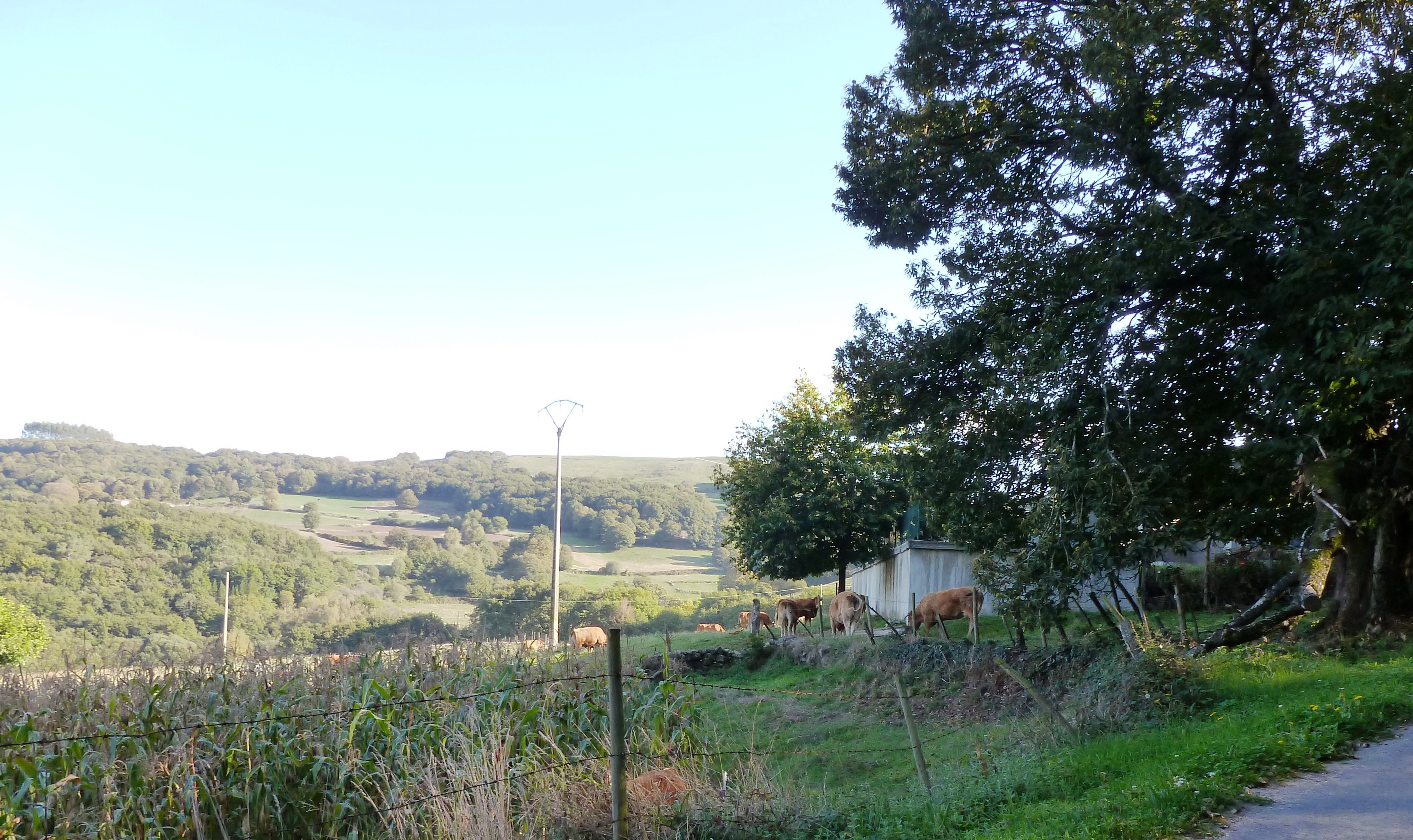 Anllo, Santa Cristina, Carballedo